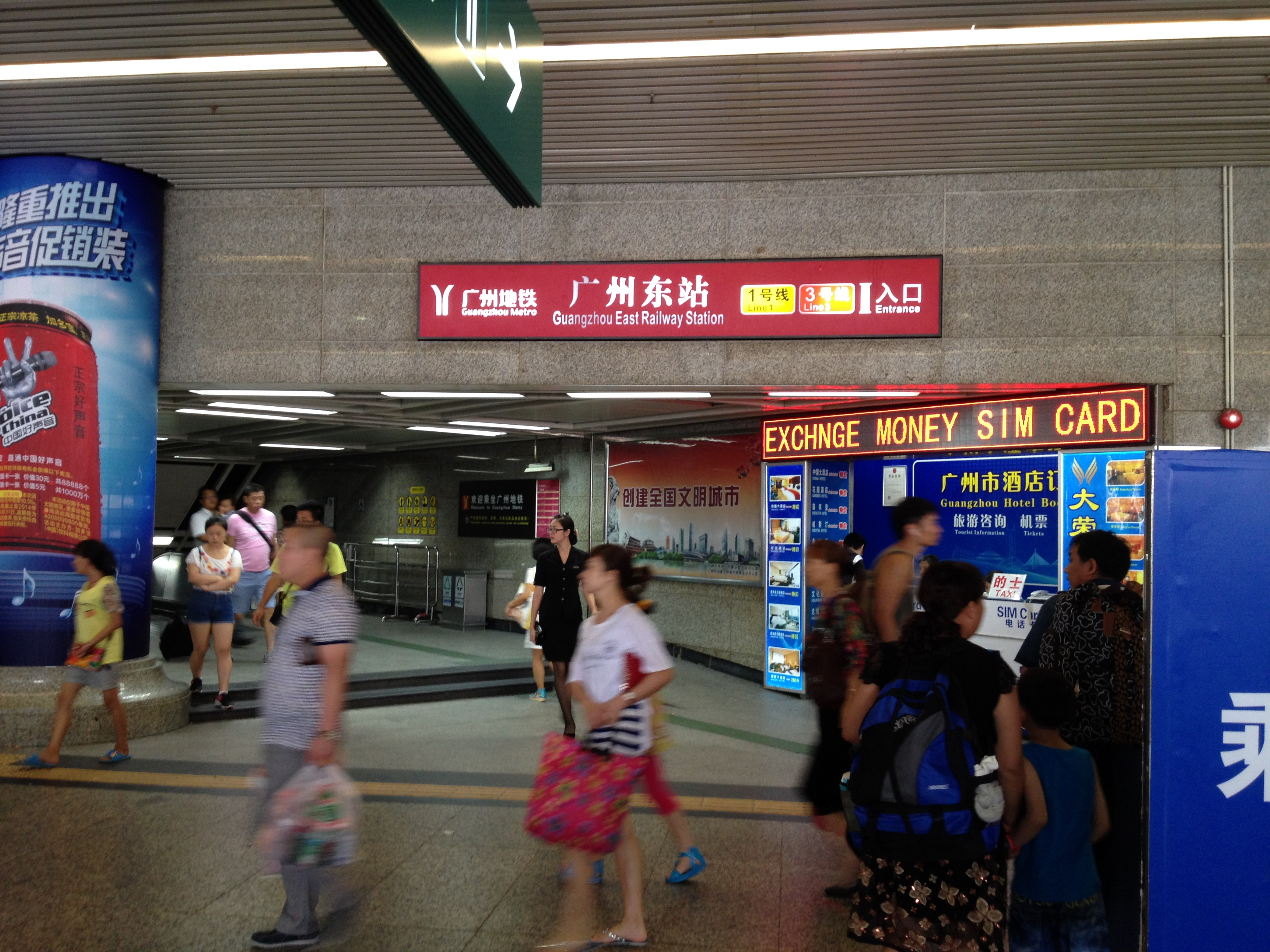 广州地铁广州东站I出口